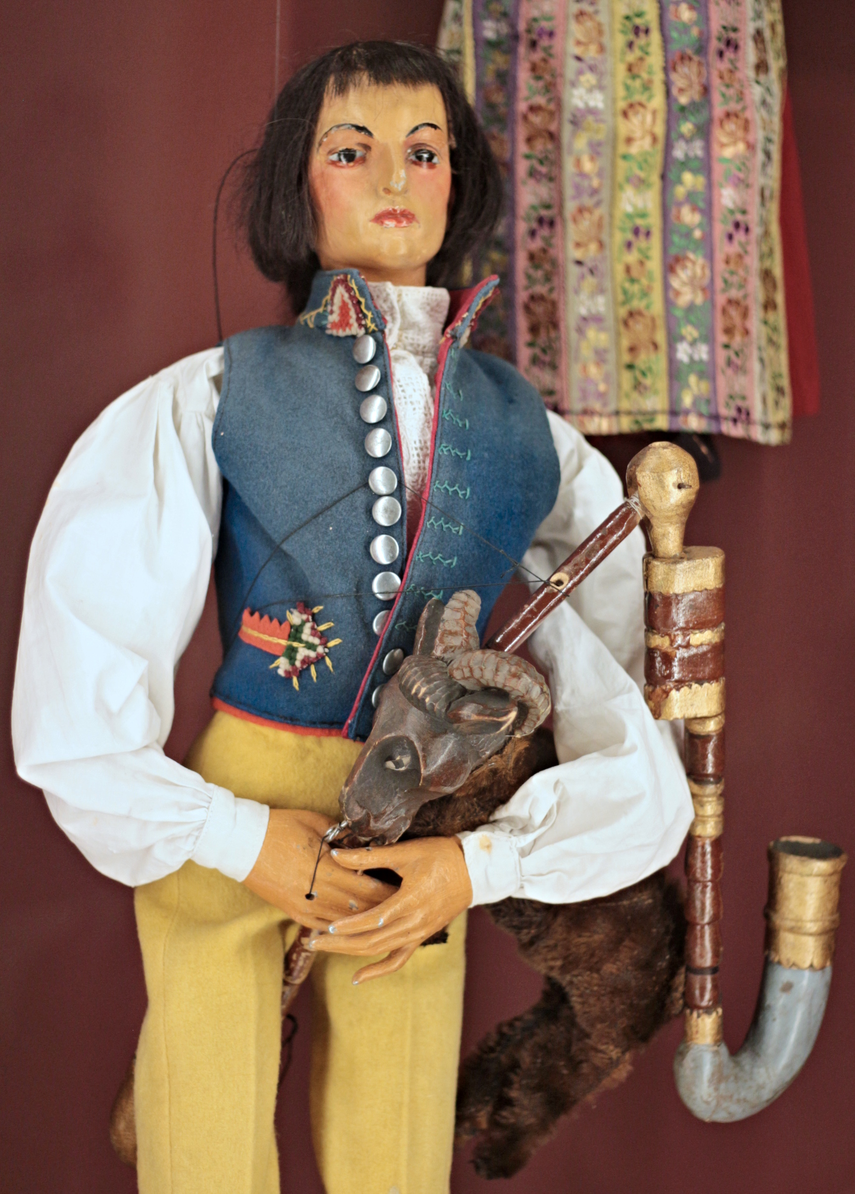 Švanda dudák, loutka k opeře